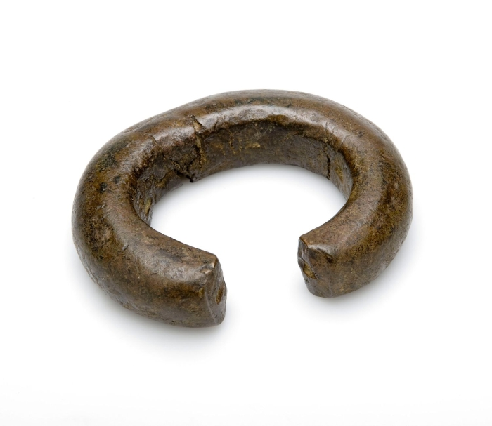 Ruilmiddel.